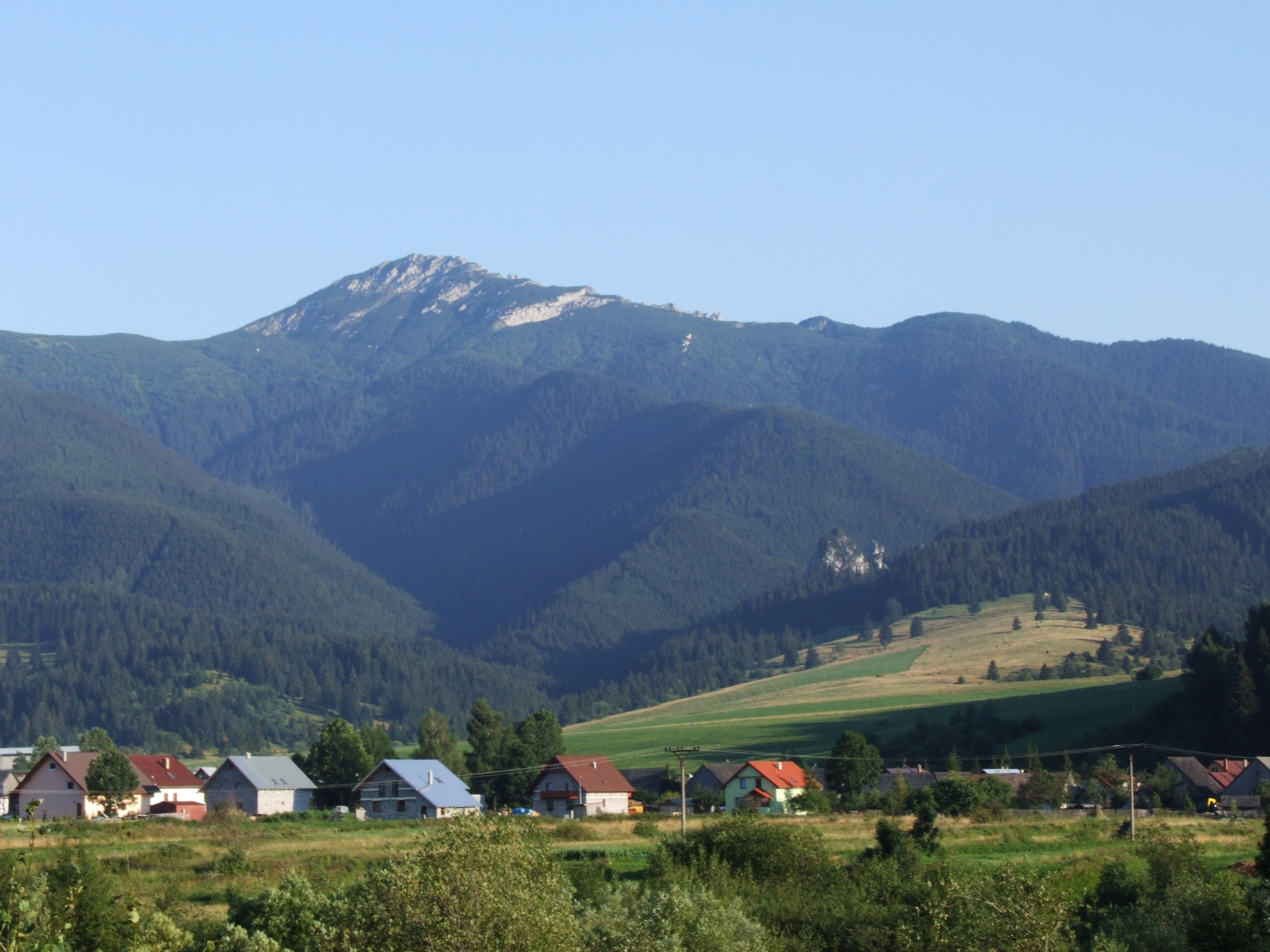 Widok od północnej strony na Siwy Wierch. Widoczna Dolina Sucha Zuberska i Dolina Siwa